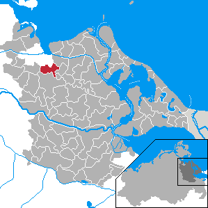 Diedrichshagen, Landkreis Ostvorpommern, Mecklenburg-Vorpommern